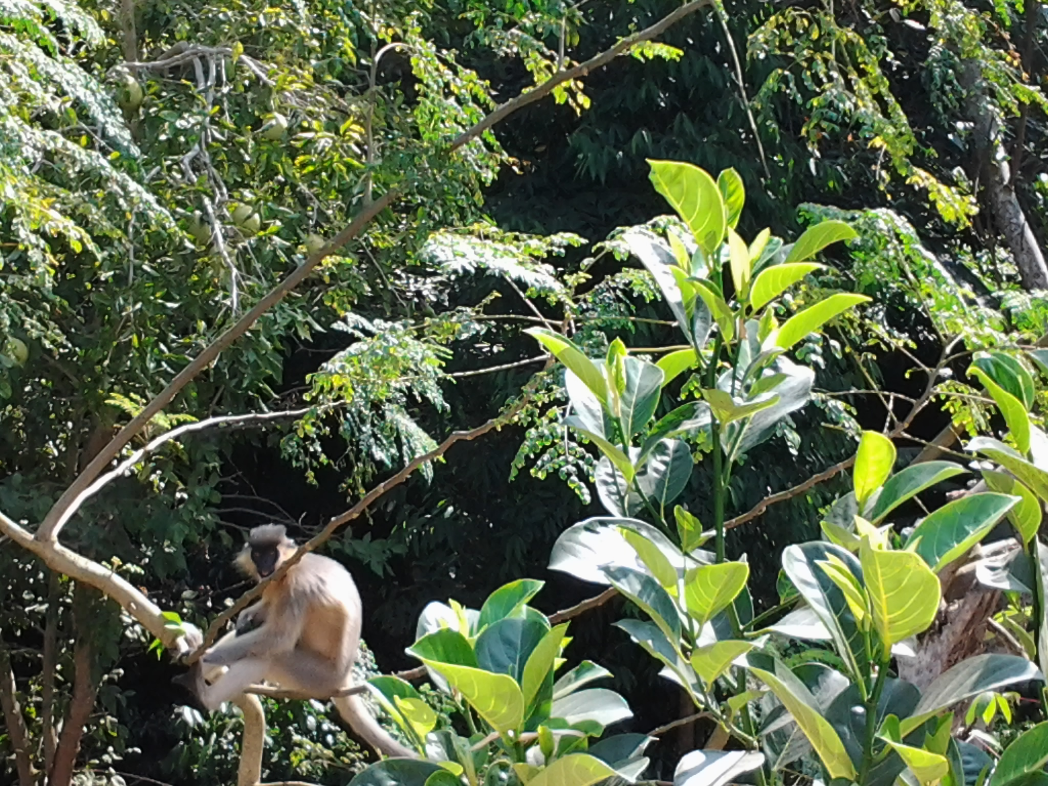 কাপ্তাই জাতীয় উদ্যান